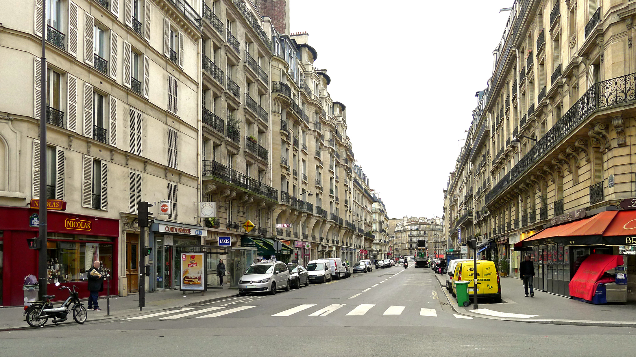 Rue Jouffroy d'Abbans - Paris XVII